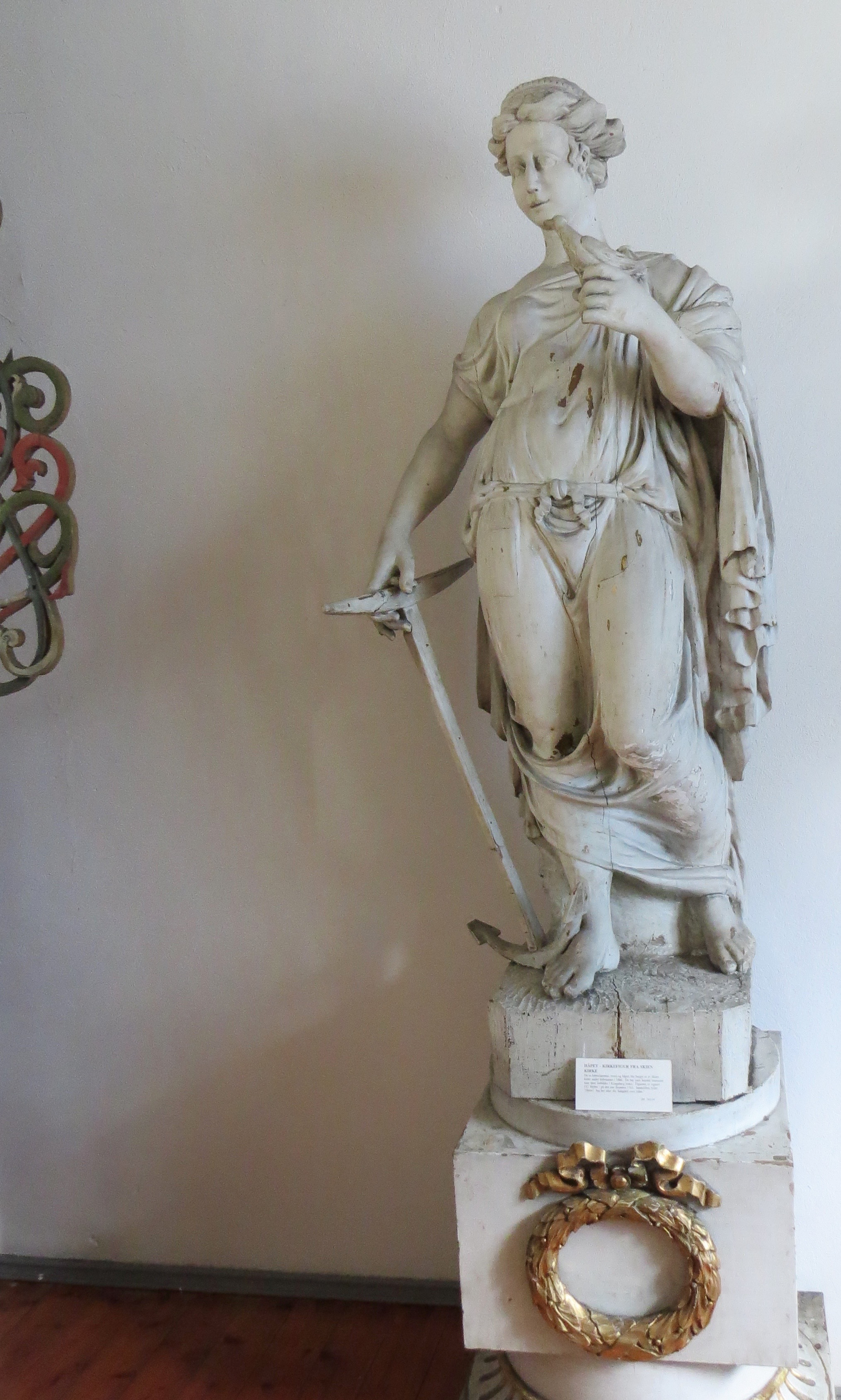 Håbet af Jacob Christian Holler fra Christianskirken, nu i Telemark Kirkemuseum, Skien, Telemark